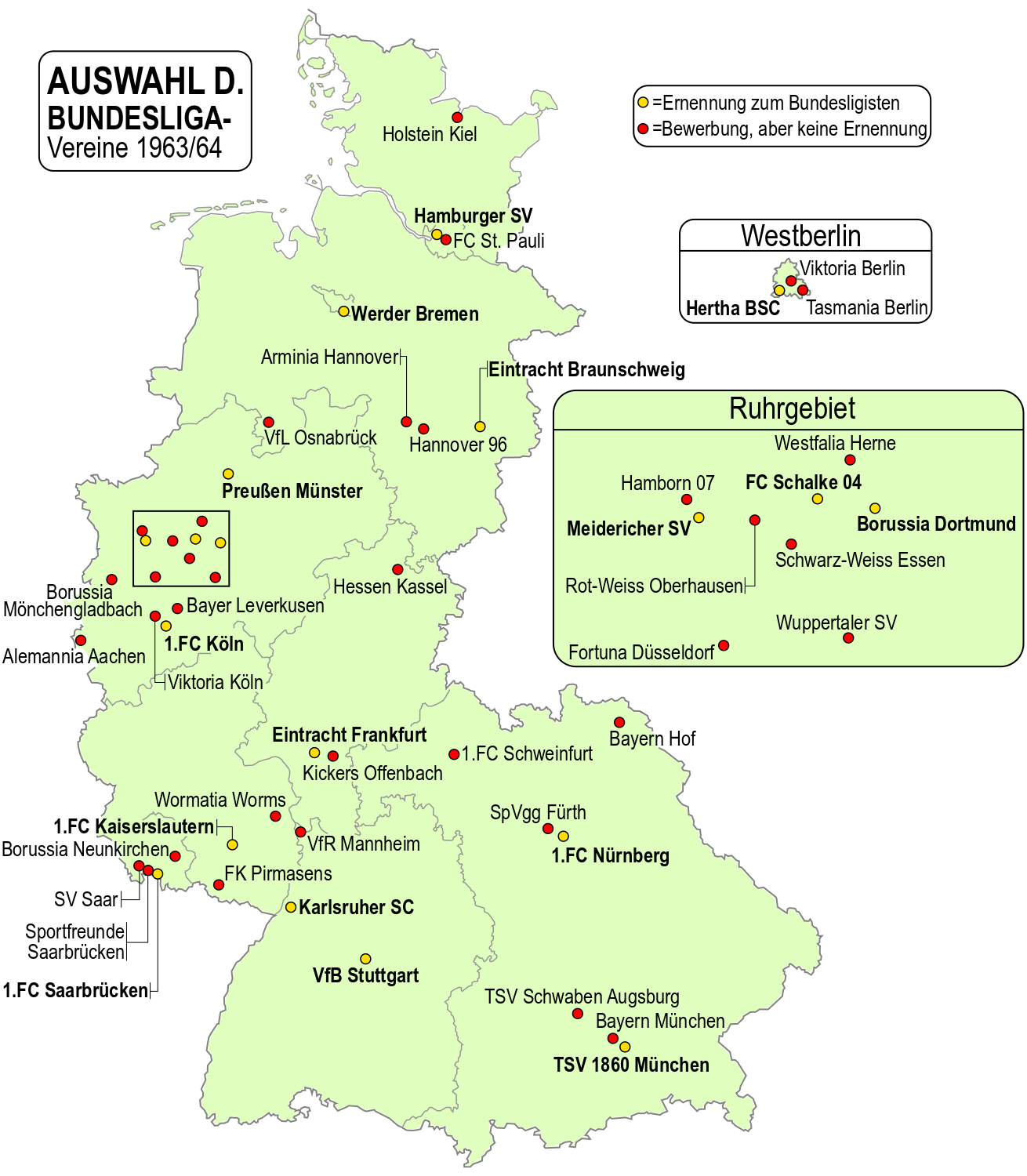 Dieses Bild zeigt ausführlich, welche Vereine sich für die erste Bundesligasaison beworben haben, sowie die Vereine, die auch angenommen wurden.